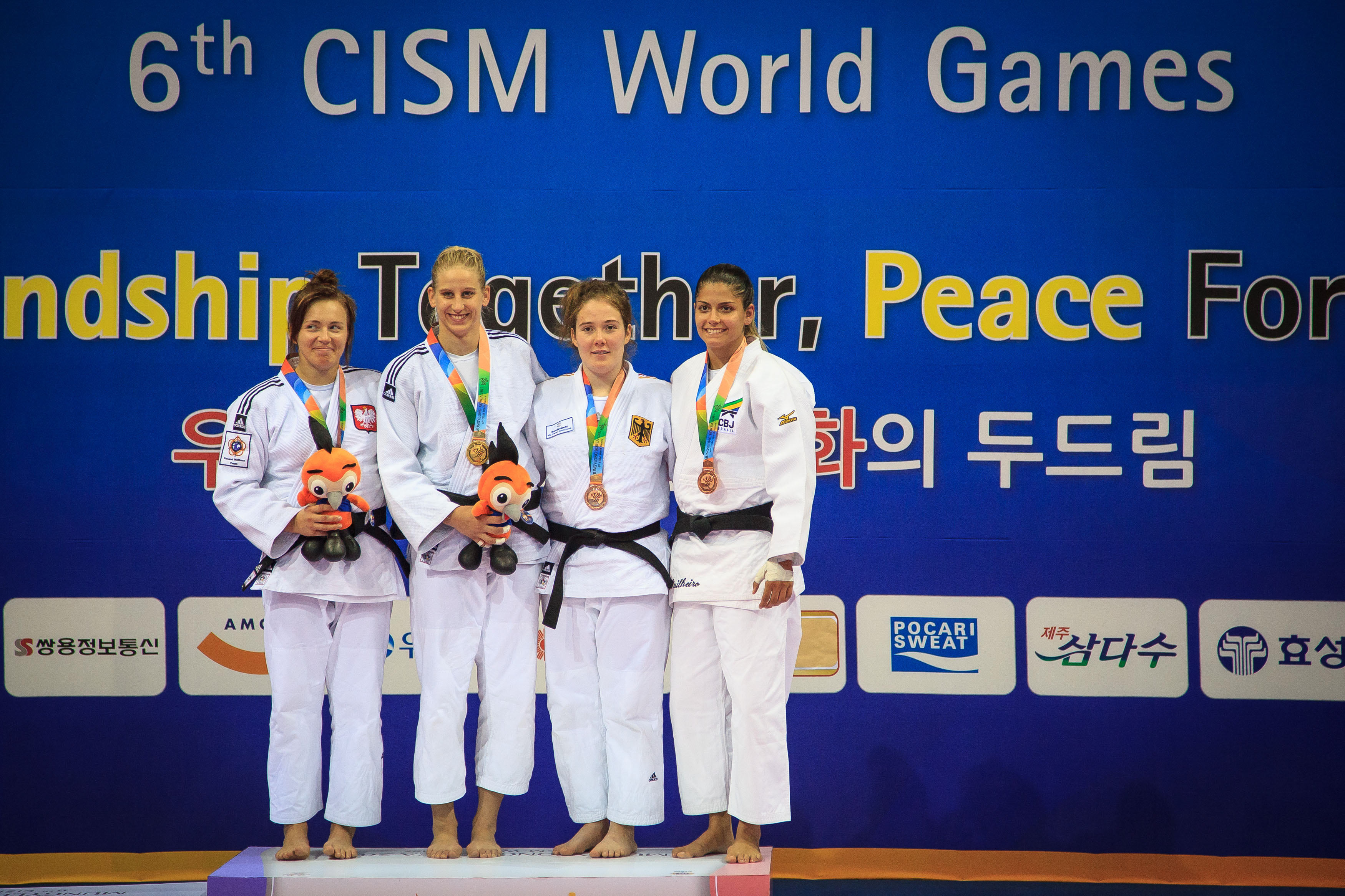 Nadia Bognatori conquista uma medalha de bronze para o Brasil no judô individual. Foto: Sgt Johnson Barros (l-r: Daria Pogorzelec, Anamari Velenšek, Julia Tillmanns, Nadia Merli)